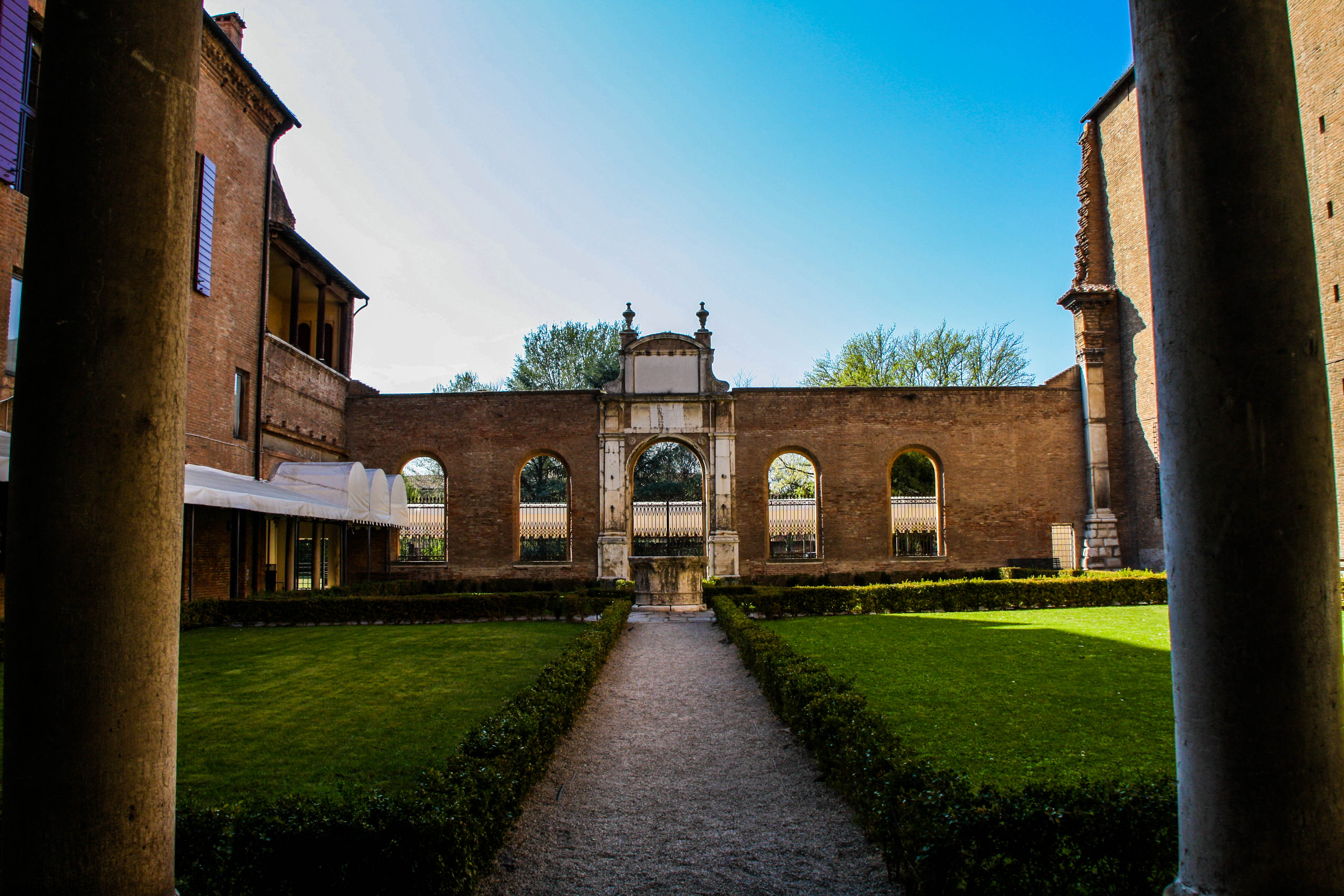 Palazzo dei Diamanti This is a photo of a monument which is part of cultural heritage of Italy.